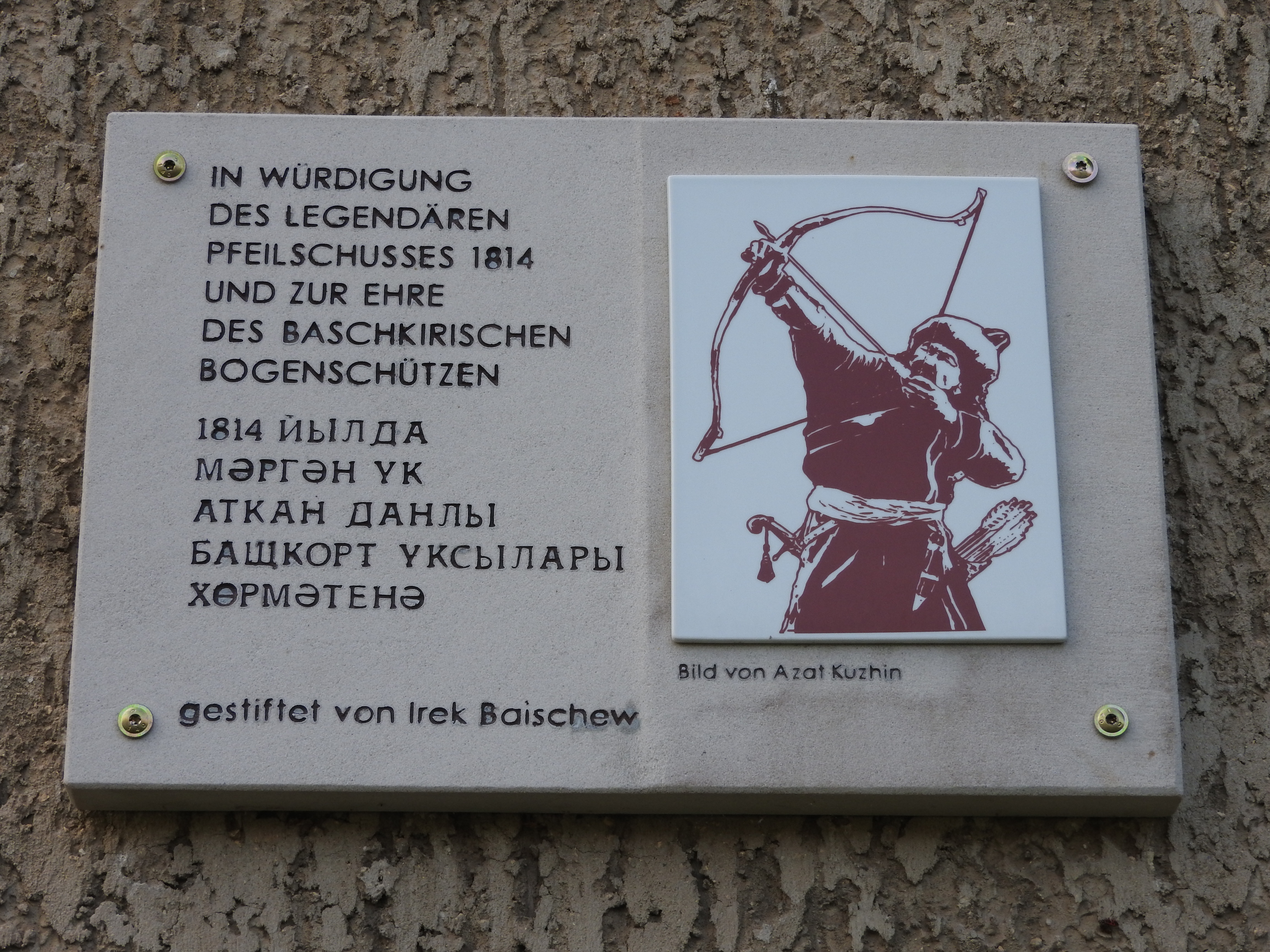 Tafel an der Kirche in Schwarza, Rudolstadt, Thüringen